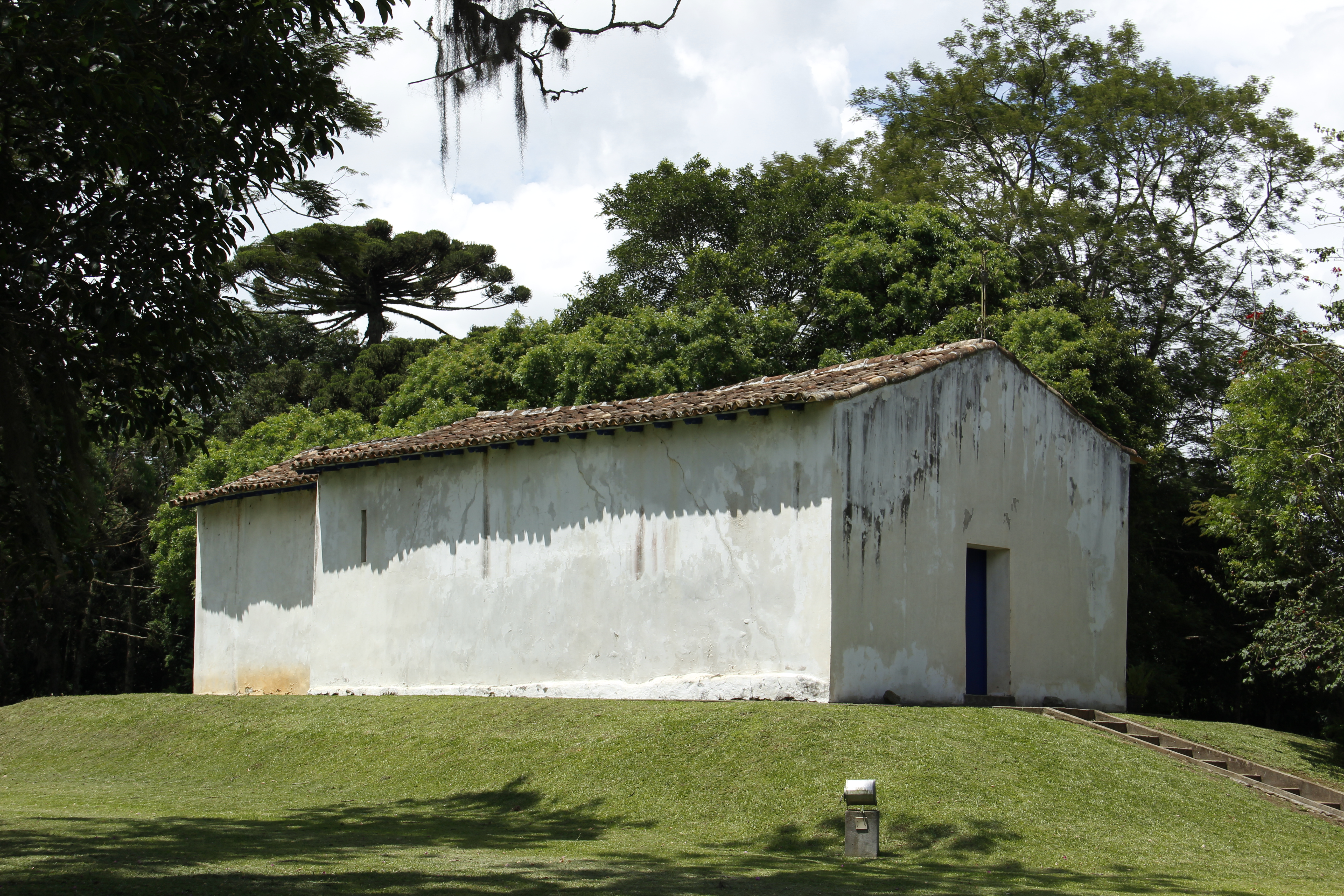 Bem tombado pela Coordenação do Patrimônio Cultural do Estado do Paraná na cidade de Ponta Grossa Cultural propertyCapela Santa Bárbara do Pitangui, Ponta Grossa, Paraná, Brazil Q65969477, P727: iPatrimônio ID: ponta-grossa-capela-santa-barbara-do-pitangui